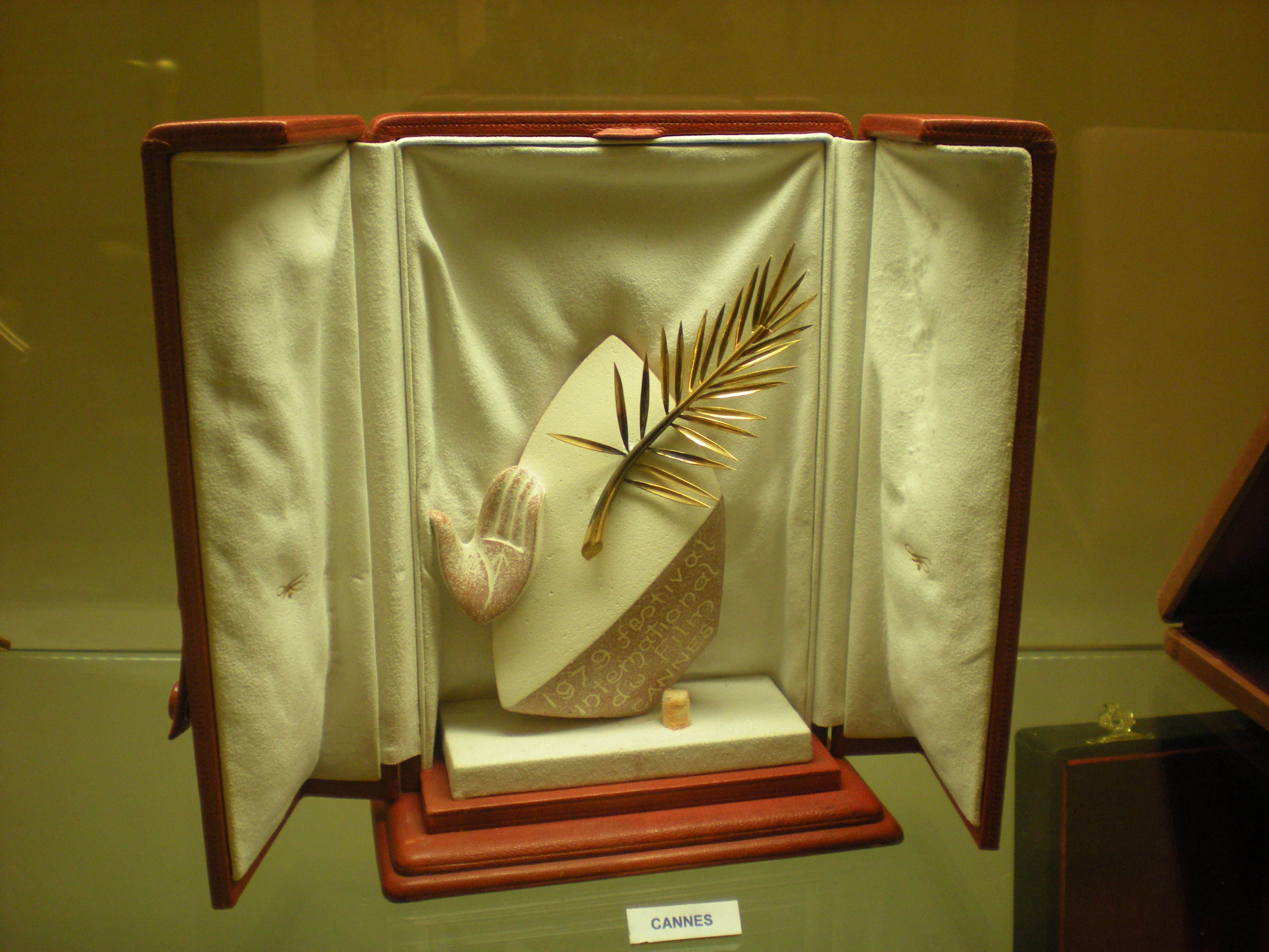 Plaquette avec la Palme d'or.